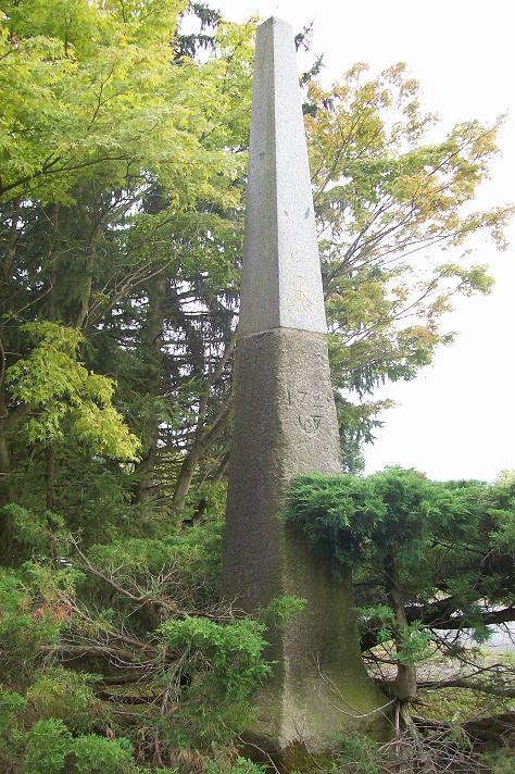 Kursächsische Ganzmeilensäule Oberreichenbach (Reichenbach/Vogtl.)